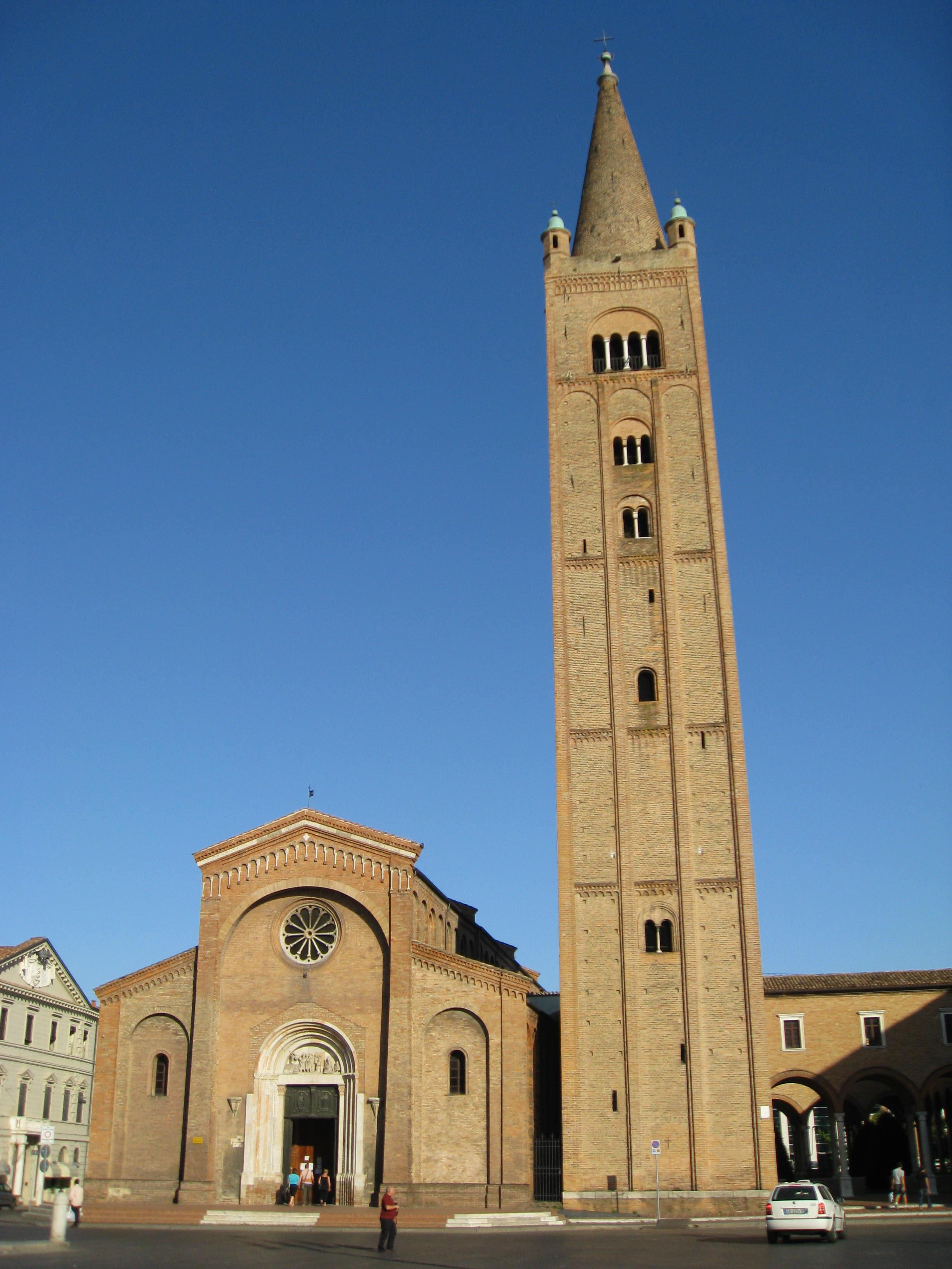 Perkele, Abbazia di San Mercuriale